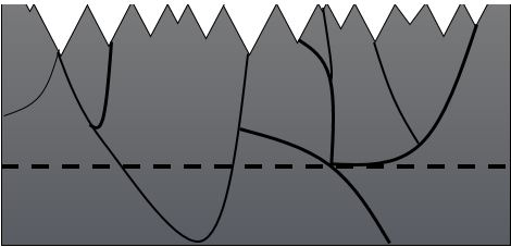 Representação transversal de defeitos em filmes finos